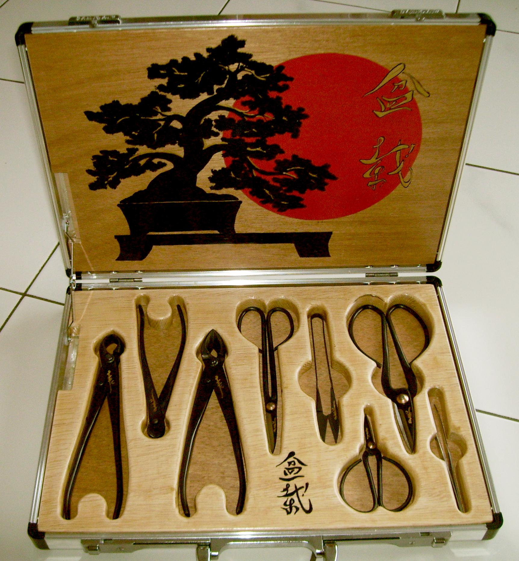 Bonsai-Werkzeug-Grundsatz